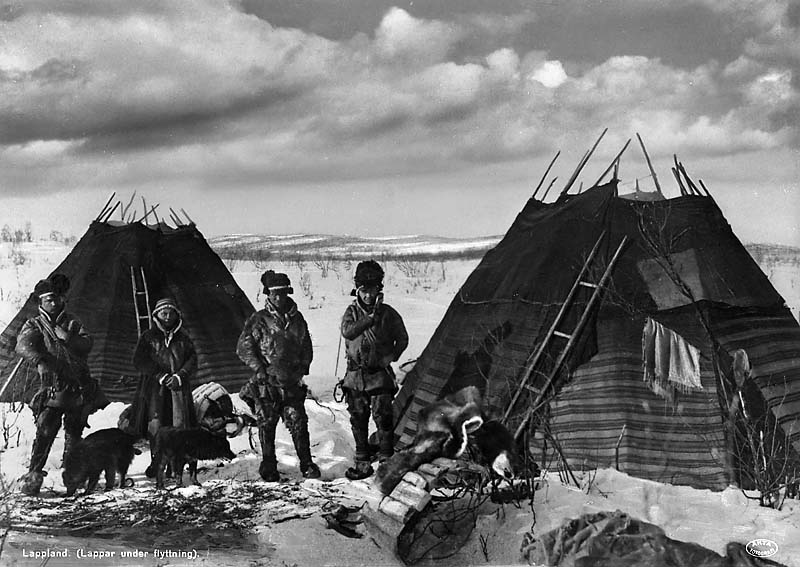 Sameläger vid Luossajärvi.; Byggnadsverk; Fjällmiljö; Miljöer; Nomadnäring; Sameviste